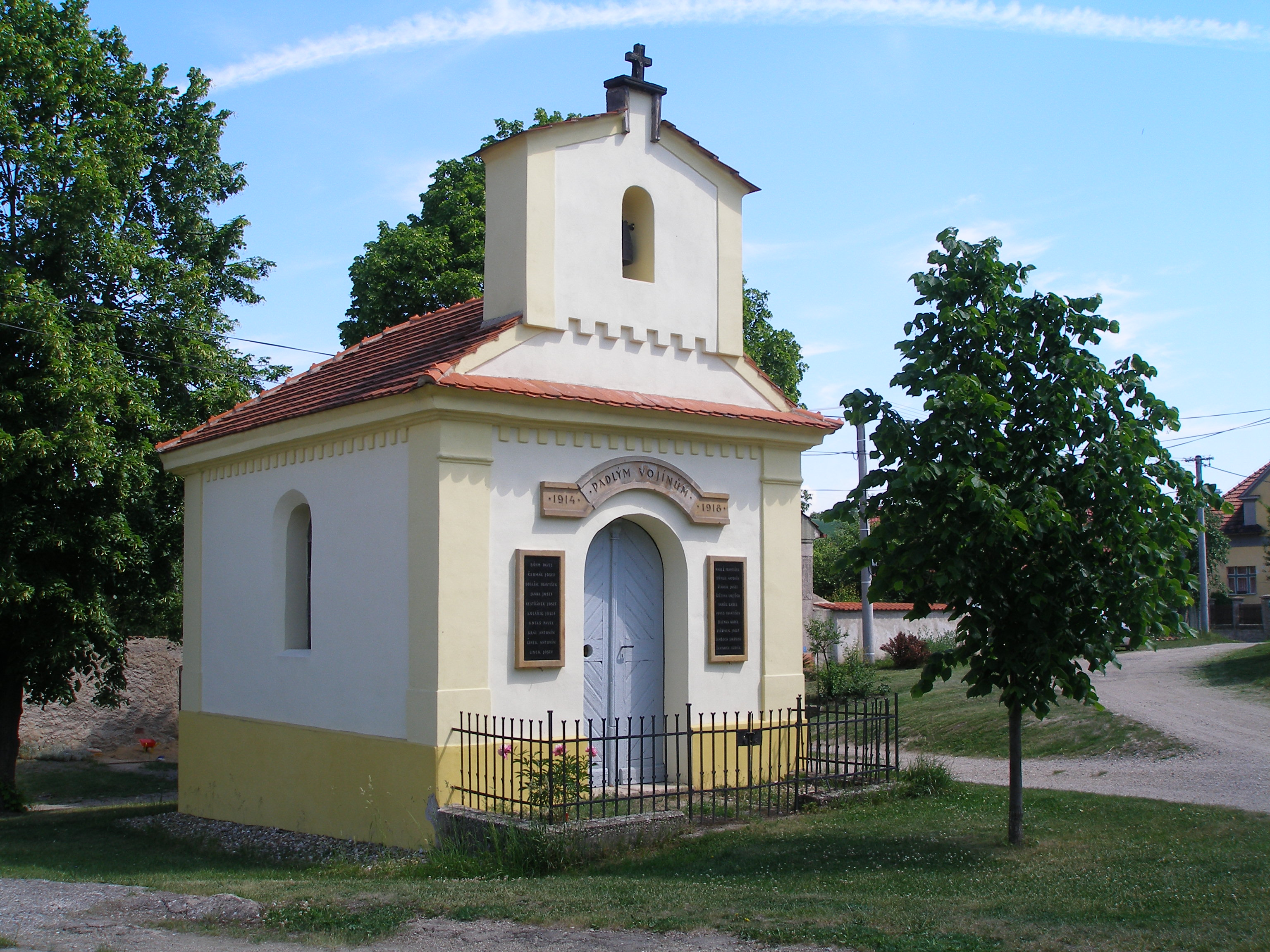 Kaplička ve Velké Bučině.